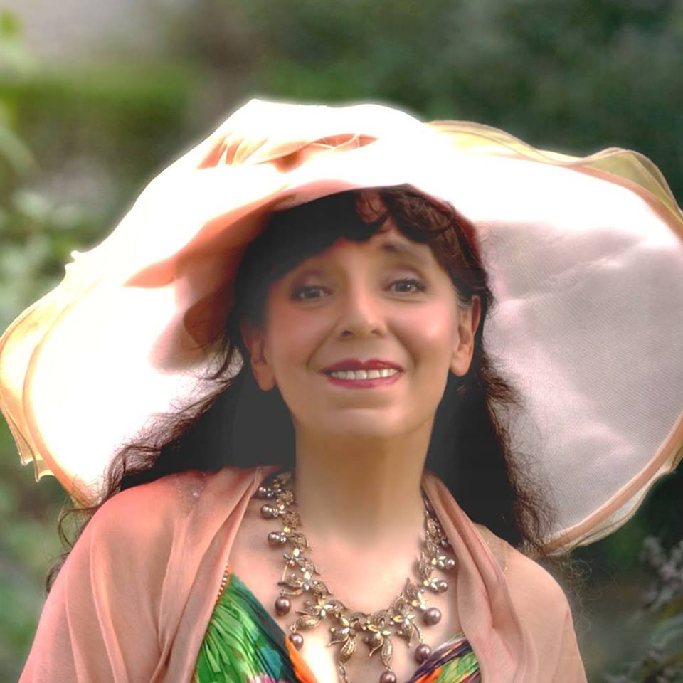 זלטה רזדולינה